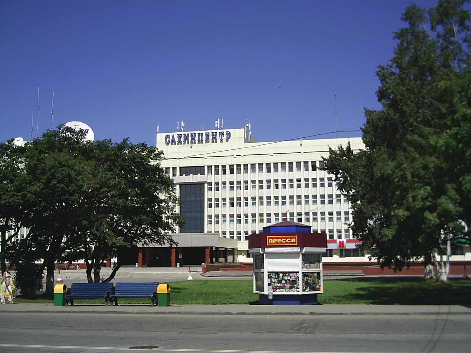 снимки августа 2006 г.